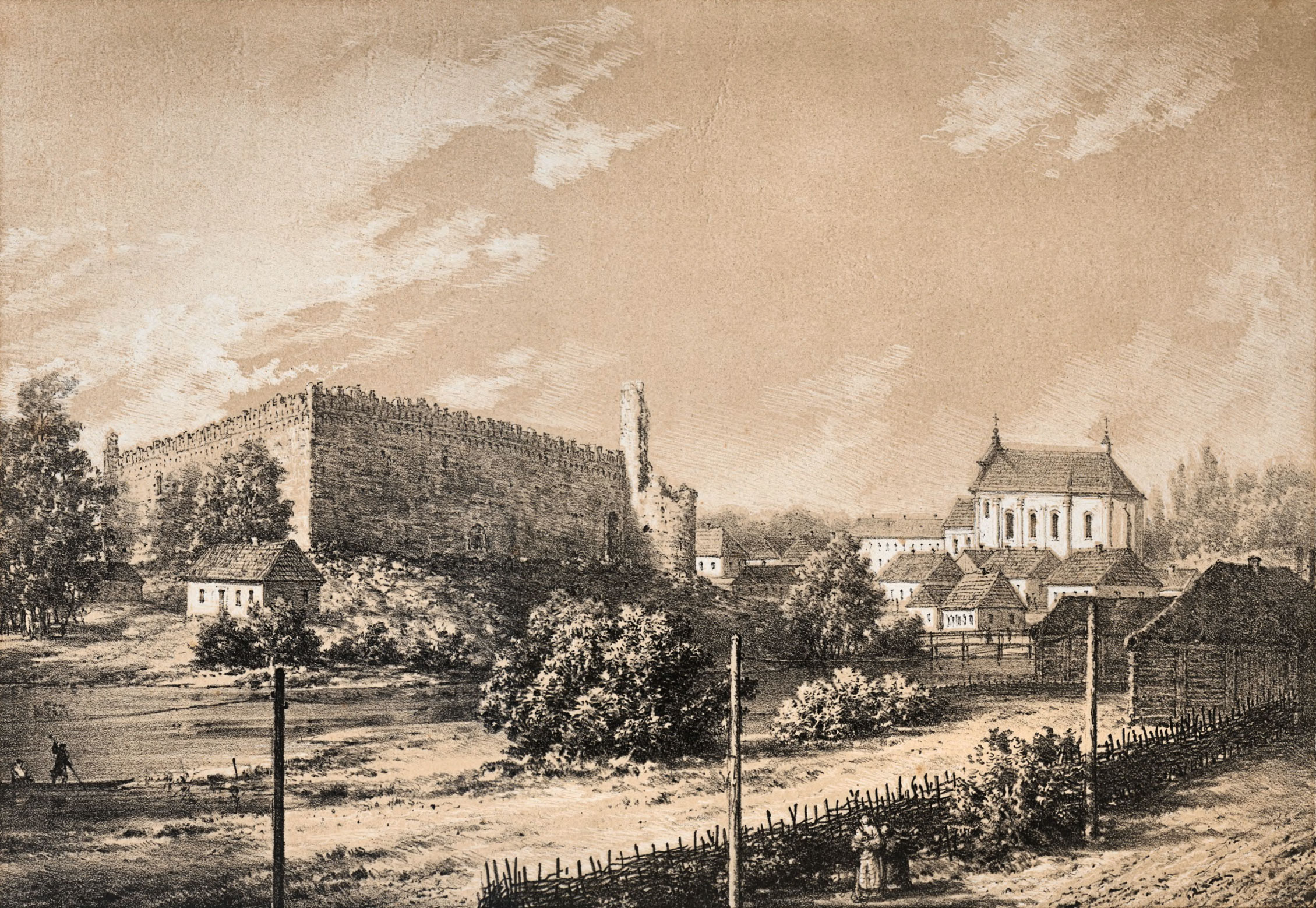 Беларуская (тарашкевіца): Ліда (Lida). Панарама замка і места